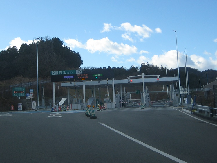 常磐自動車道浪江IC(21)